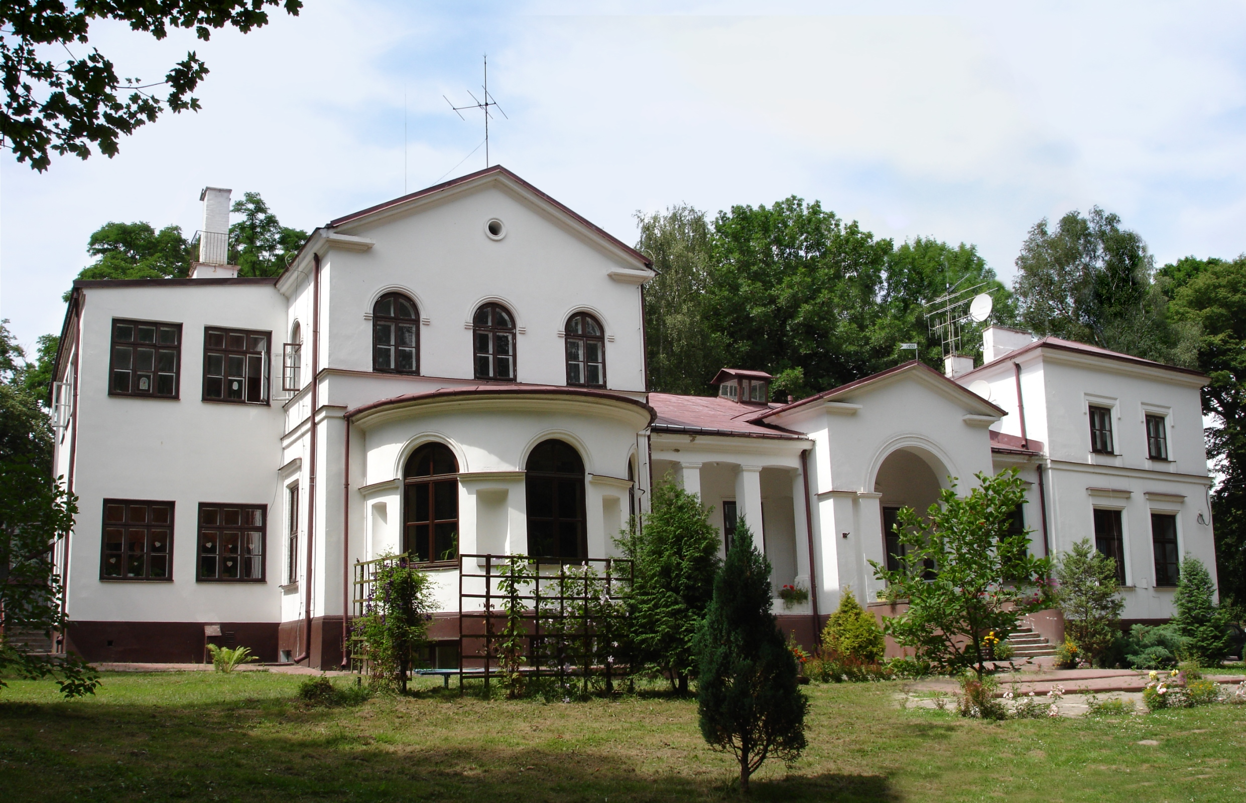 Kębło - Gmina Wąwolnica, Poland